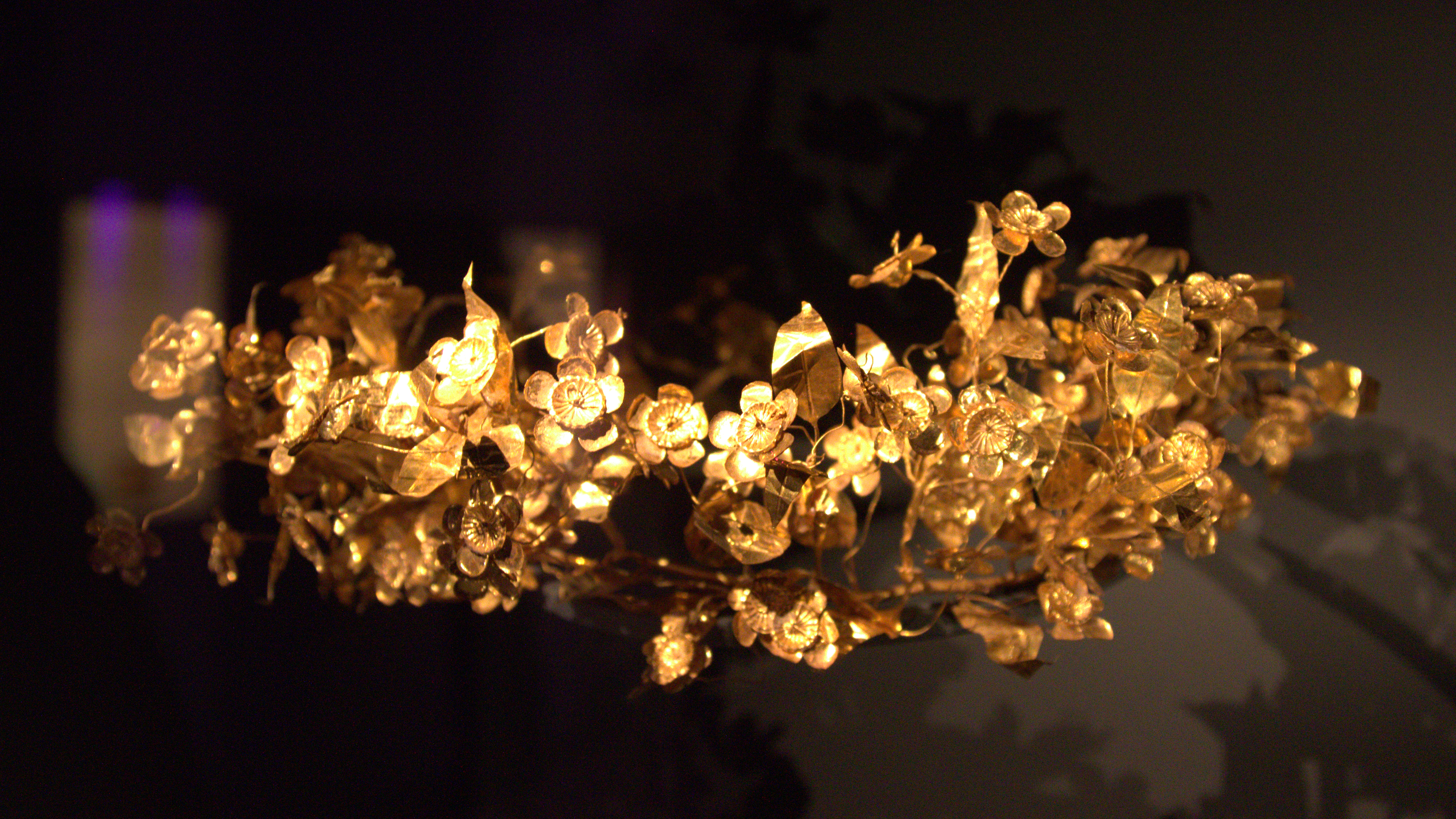 Archaeological Museum of Thessaloniki, Greece. --- Χρυσό στεφάνι μυρτιάς. Αρχαιολογικό Μουσείο Θεσσαλονίκης.